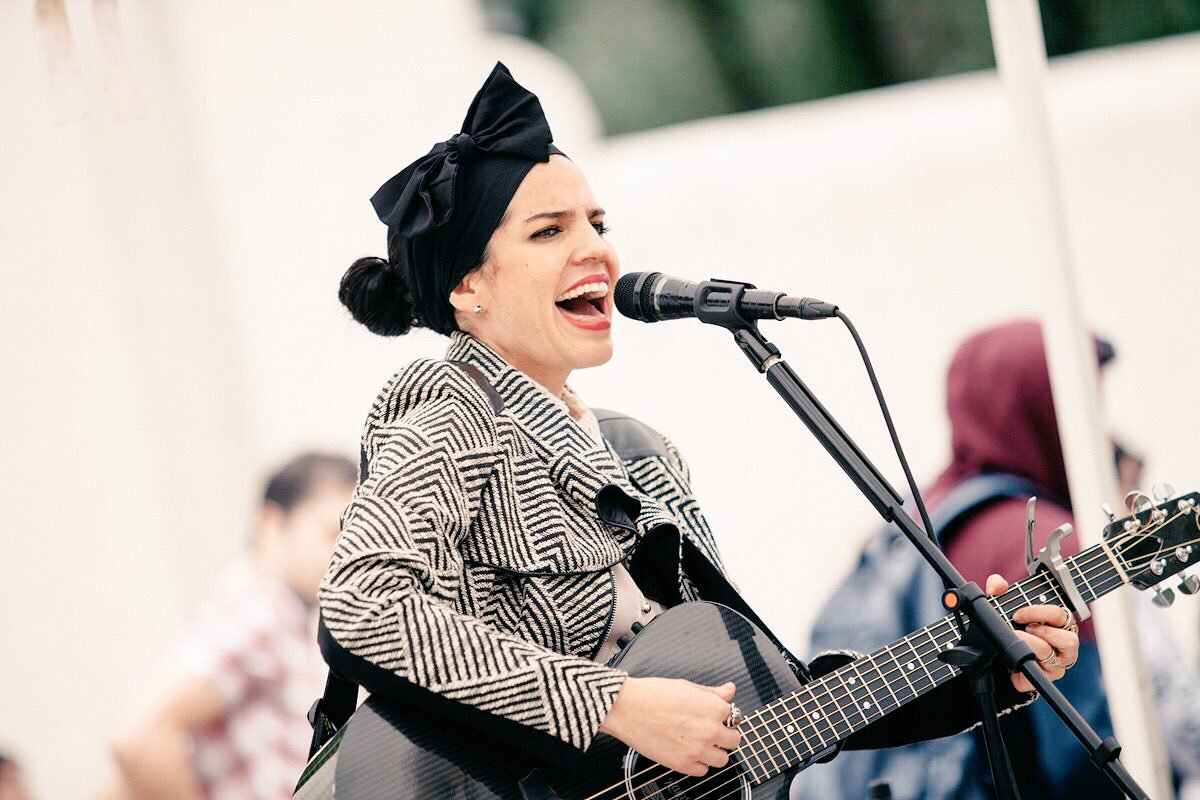 María Bernal presentandose en concierto benéfico en 2017.